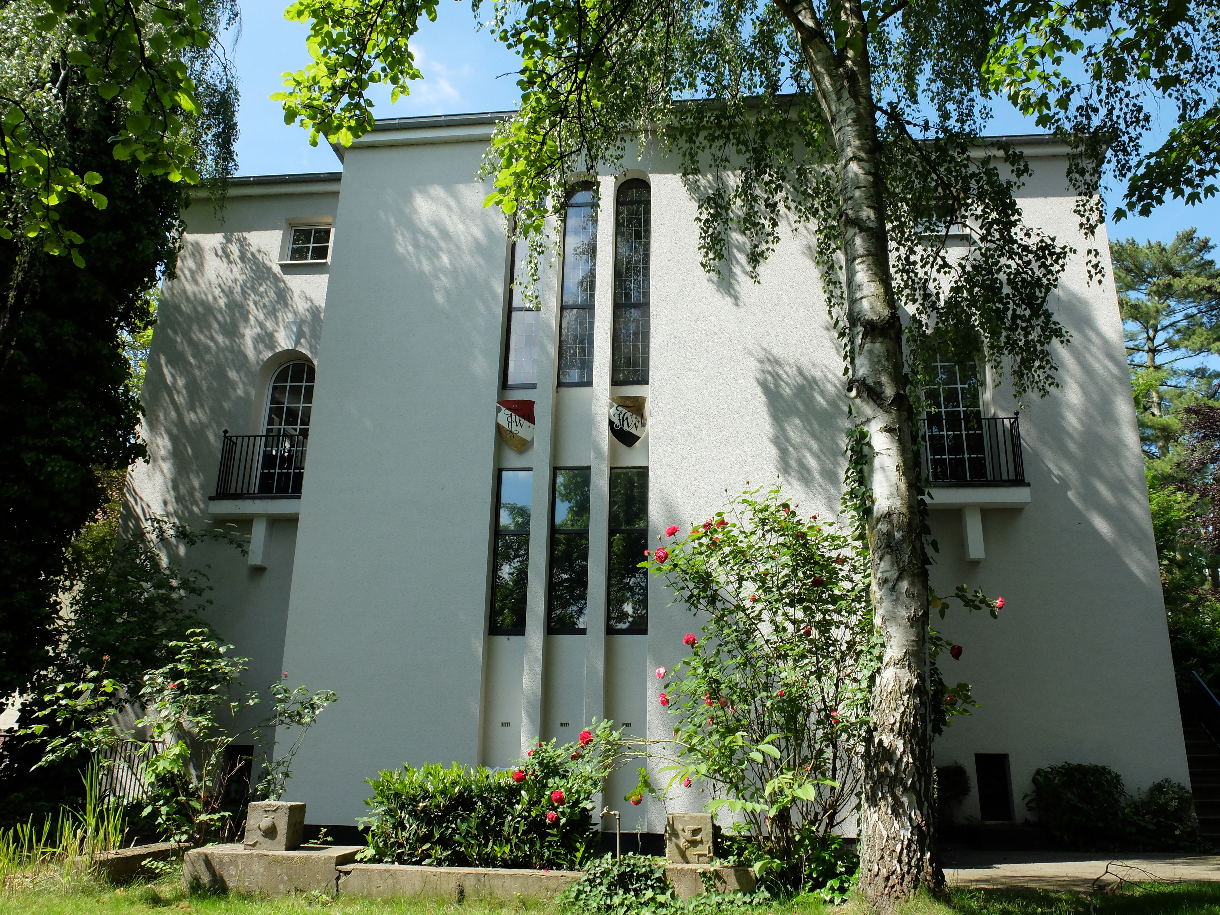 Ehemaliges Atelier und Wohnhaus des Bildhauers Prof. Franz Guntermann, erstes Gebäude im Bauhaus-Stil Münster. Das Haus steht heute unter Denkmalschutz und wird vom Münsterschen Wingolf genutzt.